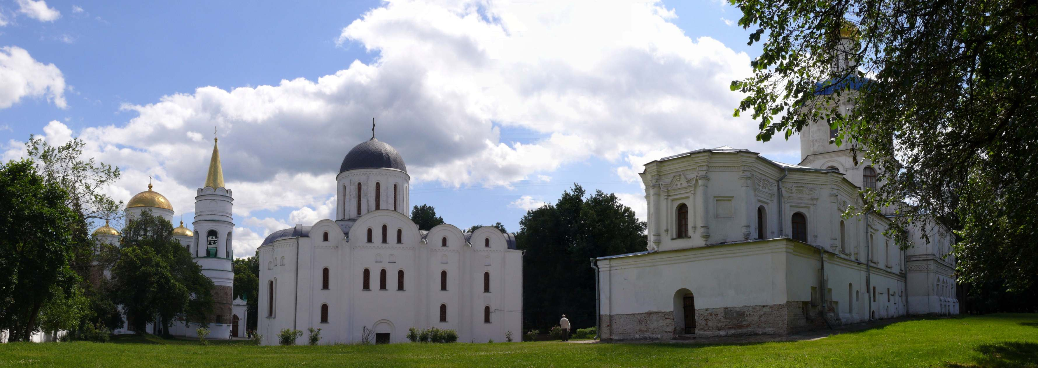 Панорама от улицы Преображенской. Храмы: Спасо-Преображенский, Бориса и Глеба, Коллегиум. Детинец. Вал. Парк им. М.Коцюбинского. Чернигов